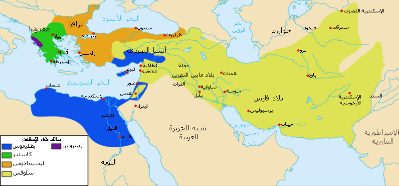 خريطة تُبيّن الممالك التي قُسمت إليها إمبراطورية الإسكندر الأكبر ووُزعت بين خلفاؤه.